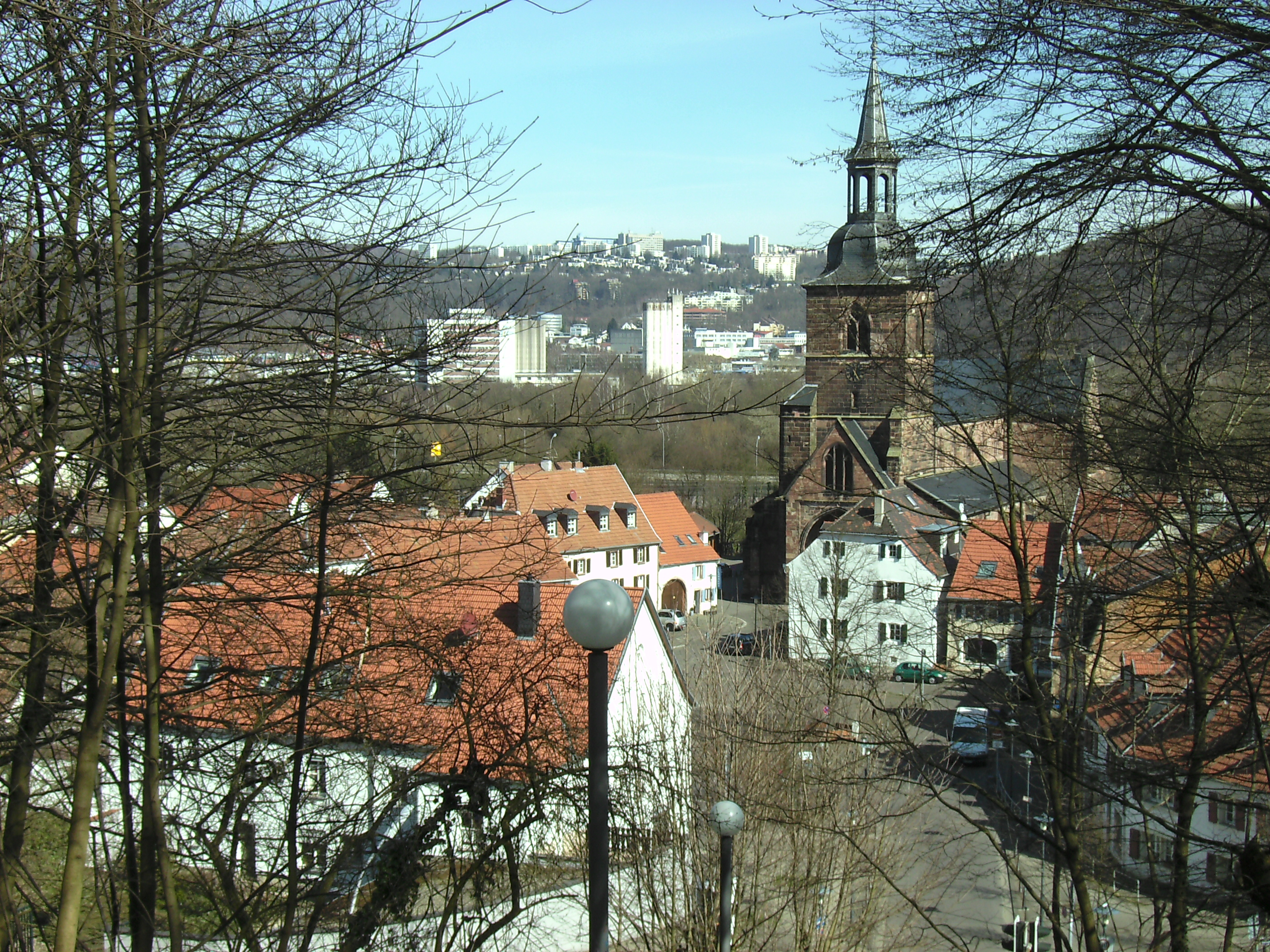 St. Arnual: alter Ortskern mit Stiftskirche